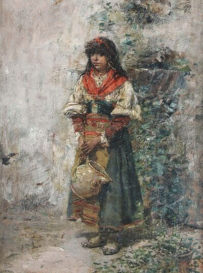 Vicente March (1859 - 1927) - La Ciociara Fuente En el dominio público por antigüedad.